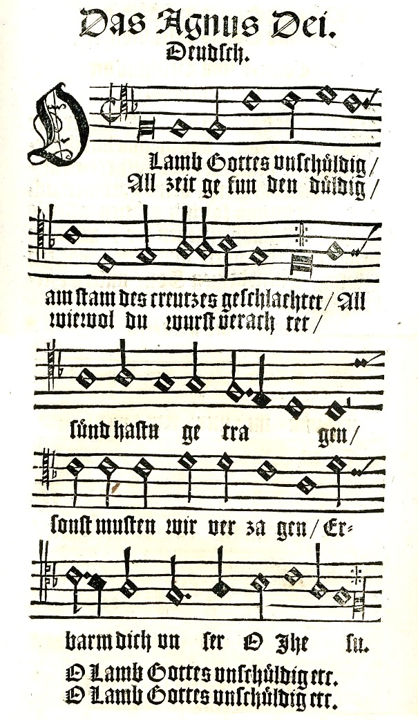 O Lamm Gottes, unschuldig, in: Kirchengesenge Deudtsch/ auff die Sontage und fürnemliche Feste/ durchs gantze jar, Magdeburg 1545